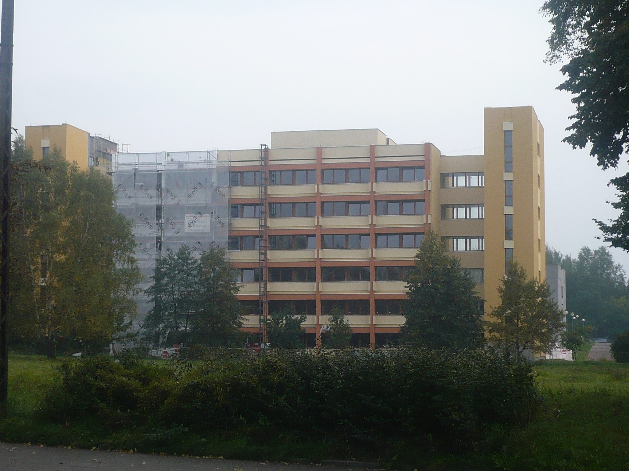 Budynek Wydziału Fizyki i Informatyki Stosownej Uniwersytetu Łódzkiego (ul. Pomorska).